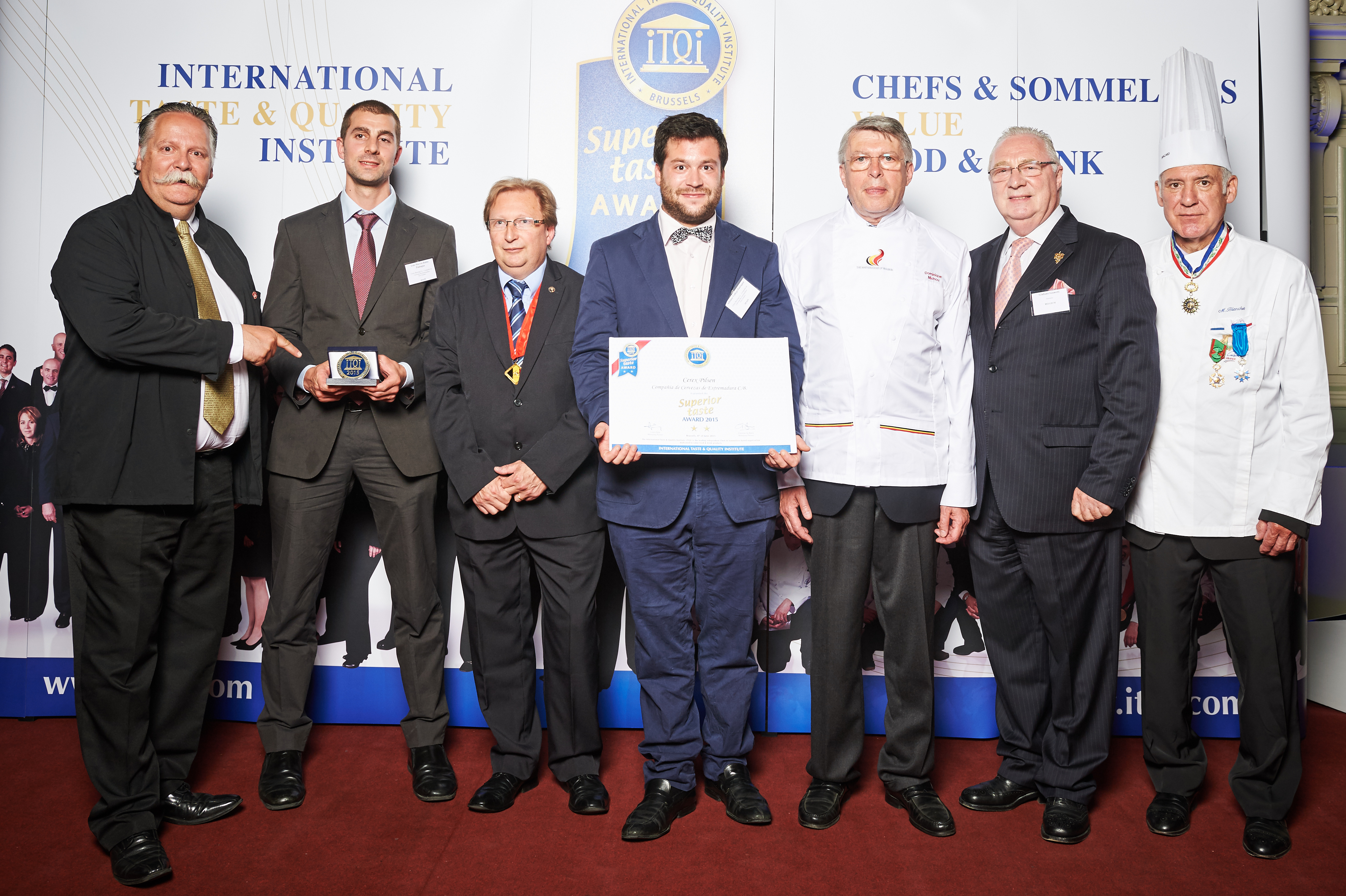 Premios Superior Taste Award. Organismo: International Taste & Quality Institute (Bruselas, Bélgica). El «iTQi Superior Taste Award» es el único sello de calidad en sabor otorgado por líderes de opinión, Chefs y Sommeliers con estrellas Michelin. Los miembros del Jurado de iTQi, provenientes de 17 países diferentes, forman parte de las asociaciones culinarias más prestigiosas de Europa, tales como, los Maîtres Cuisiniers de France, l’Académie Culinaire de France, la Academy of Culinary Arts, Euro-Toques, la Federazione Italiana Cuochi, la Nordic Chefs Association, la Asociación de Cocineros de España, la World Master Chefs Society, el Verband der Köche Deutschlands, así como la Association de la Sommellerie Internationale (ASI) para las bebidas.